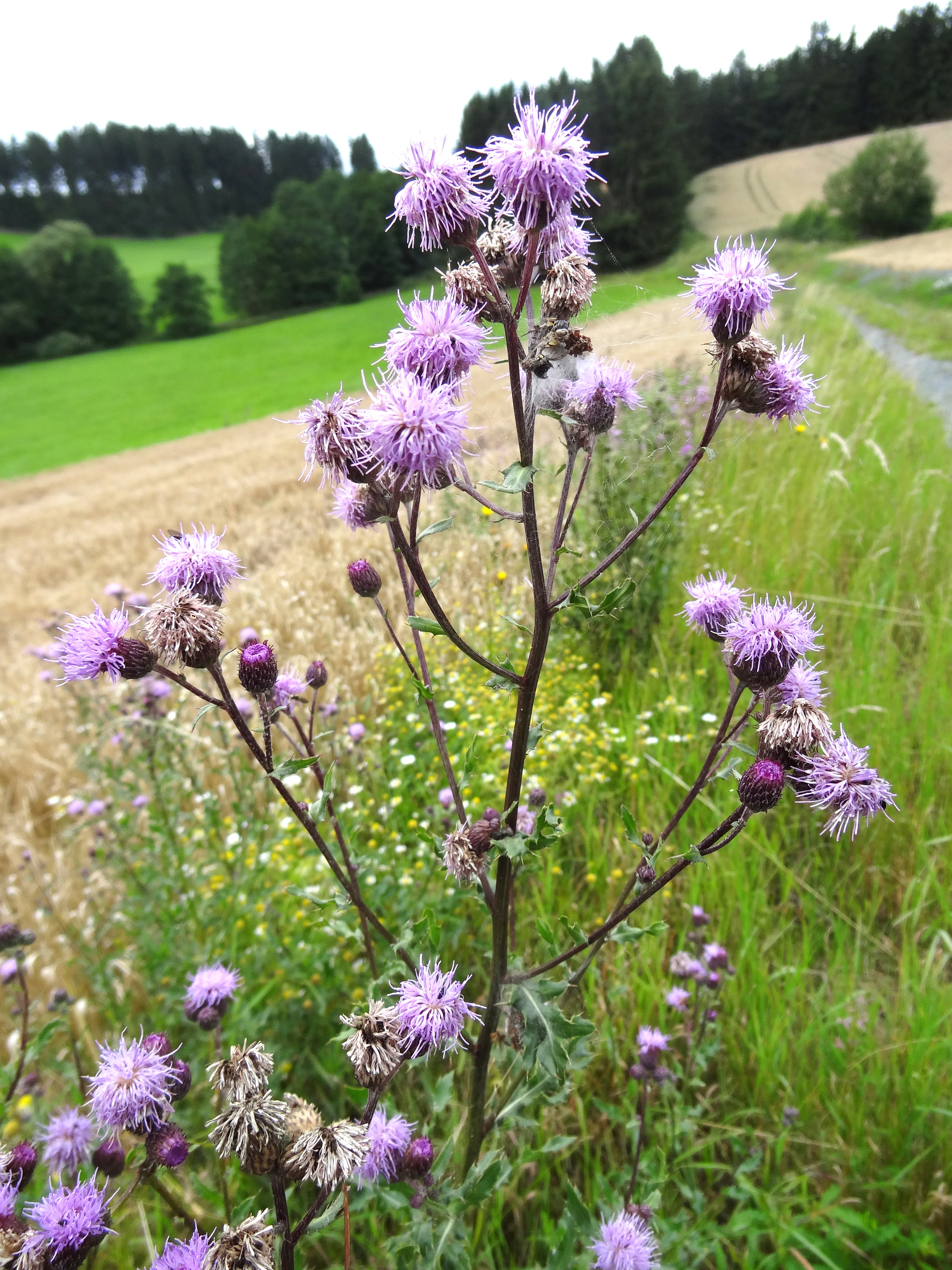 Acker-Kratzdistel, Asteraceae, Deutschland, Bayern, Oberfranken, Selbitz Foto: U.Schmidt, 23.VII.2012